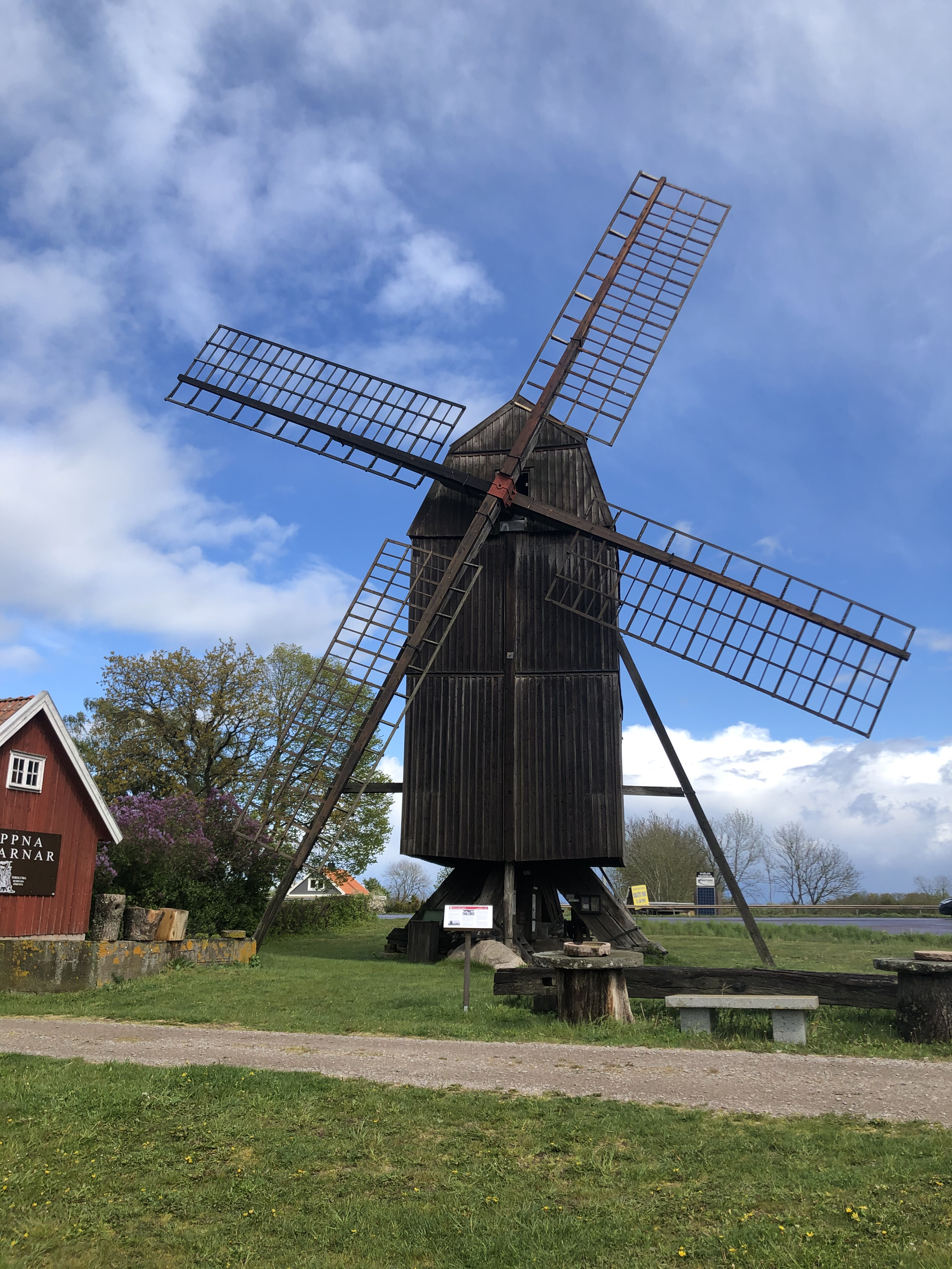 Kvarnkungen i Björhovda, Mörbylånga kommun, Öland är Skandinaviens största stubbkvarn